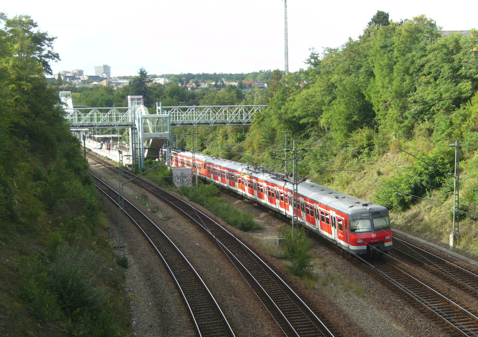 Triebwagen der S-Bahn Stuttgart Richtung Hauptbahnhof fährt auf der Verbindungsbahn in den Bahnhof Österfeld ein